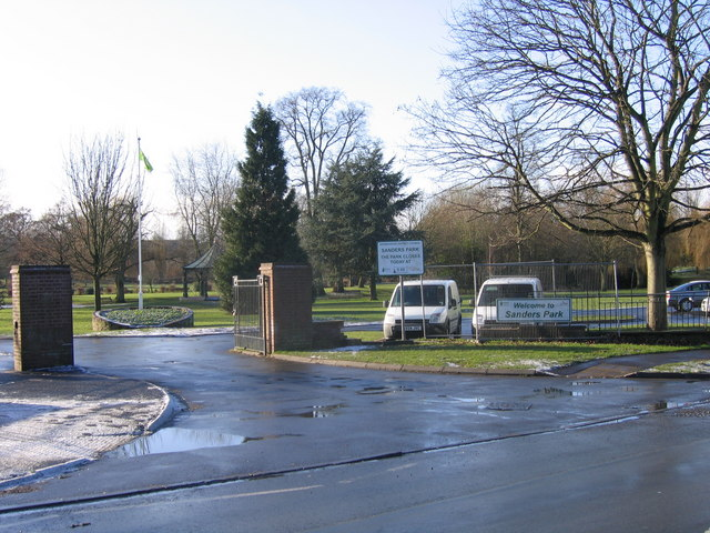 Sanders Park Bromsgrove